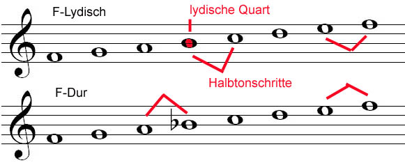 Lydisch im Vergleich mit Dur